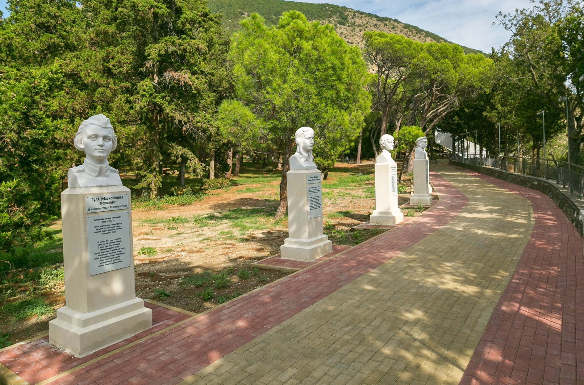 Памятники артековцам - героям Великой Отечественной Войны, установленные в Международном Детском Центре «Артек».